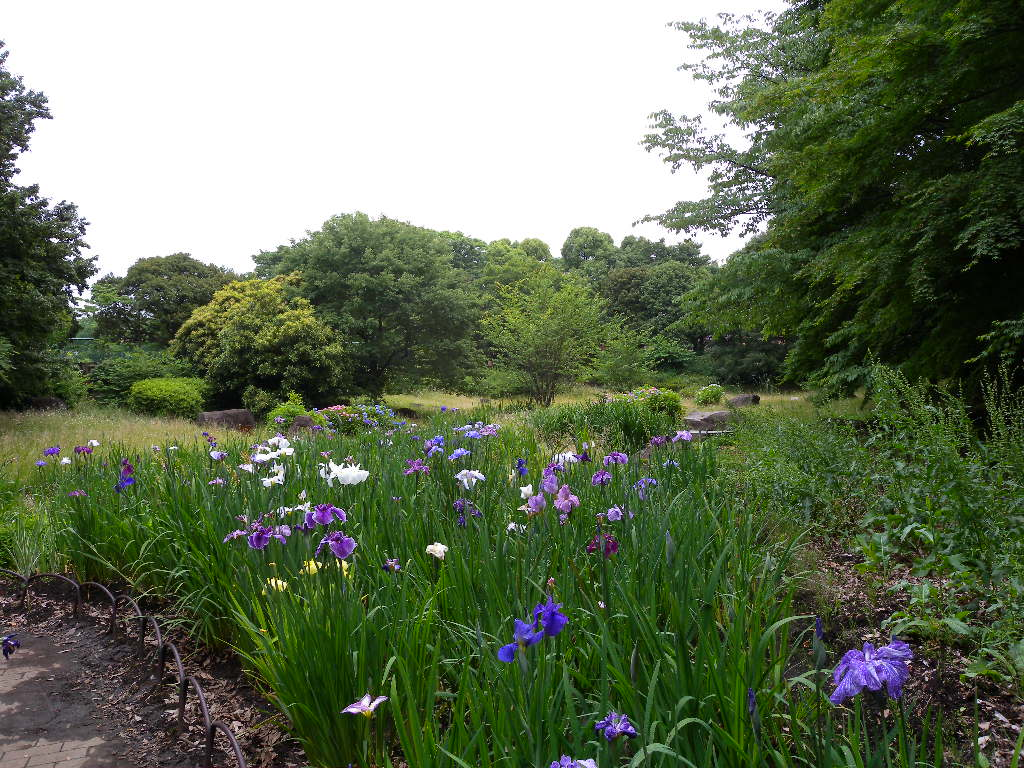 麻生水処理センター・雨水調整池